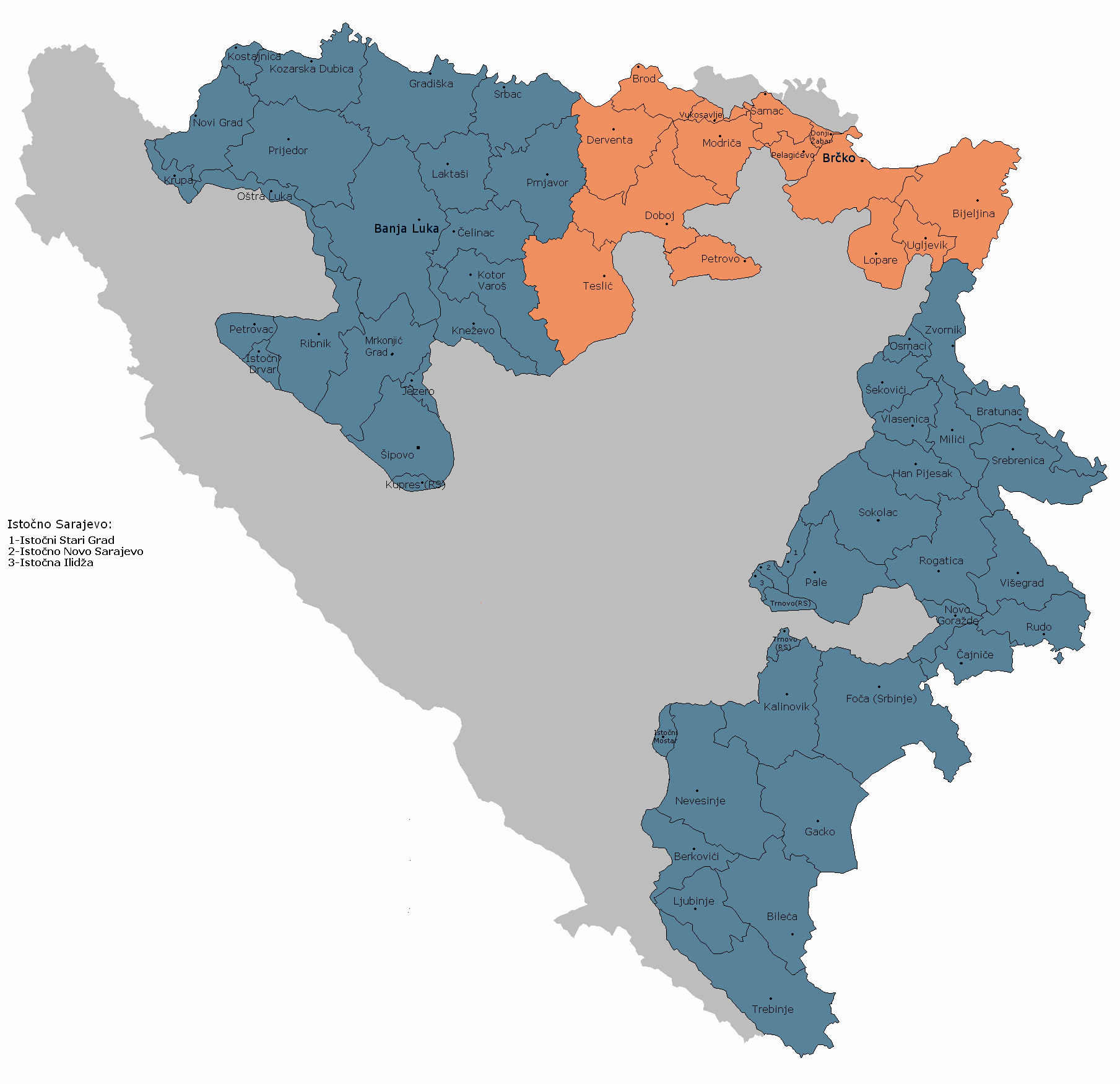 Добојско-бијељинска регија према уџбеницима географије